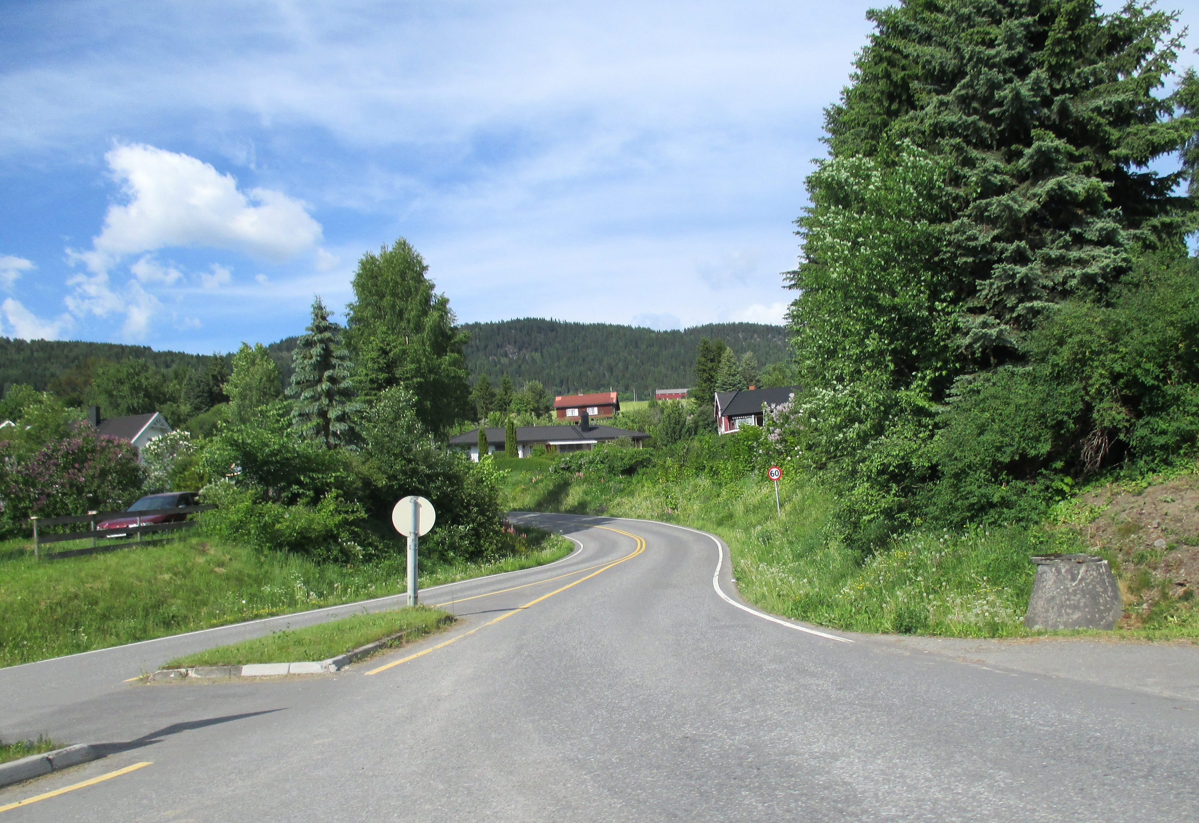 Fylkesvei 1674 (tidl. 16) tar av fra primær fylkesvei 213 ved Vea.